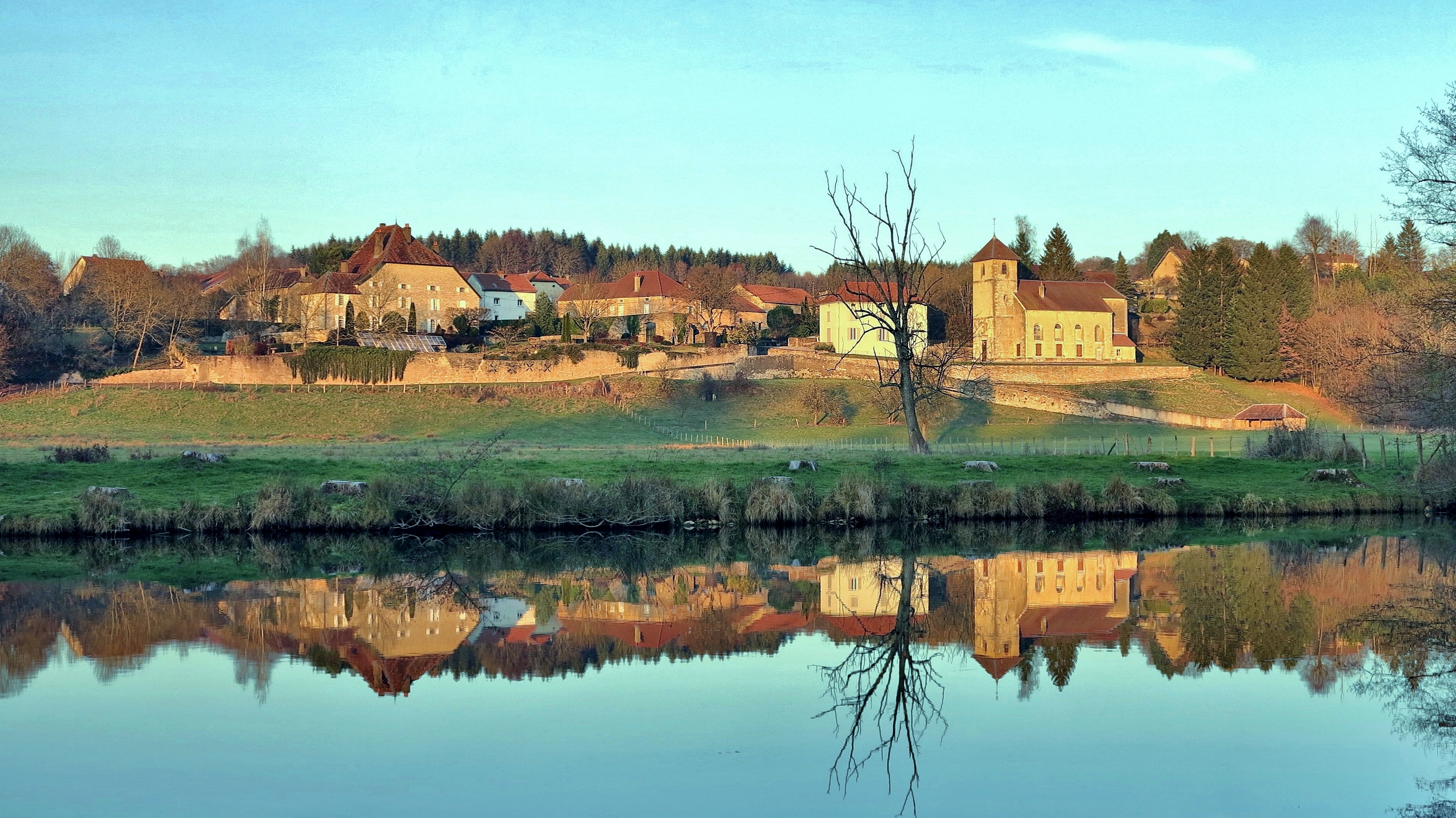 le bourg de Thiénans et son reflet sur l'Ognon